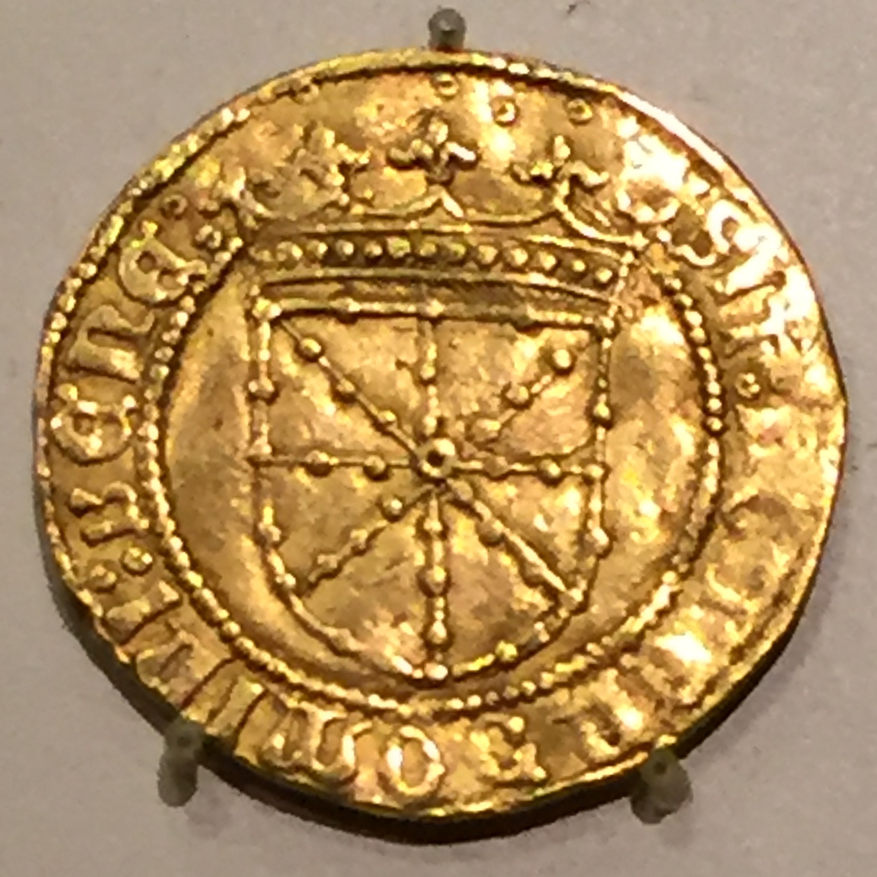 Doble ducado de oro, acuñado en Pamplona entre 1513 y 1516, durante el reinado de Fernando II el Católico; en el Museo Arqueológico Nacional de Madrid.